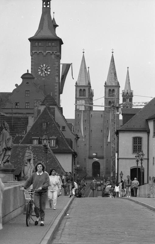 Juni 1988 Würzburg